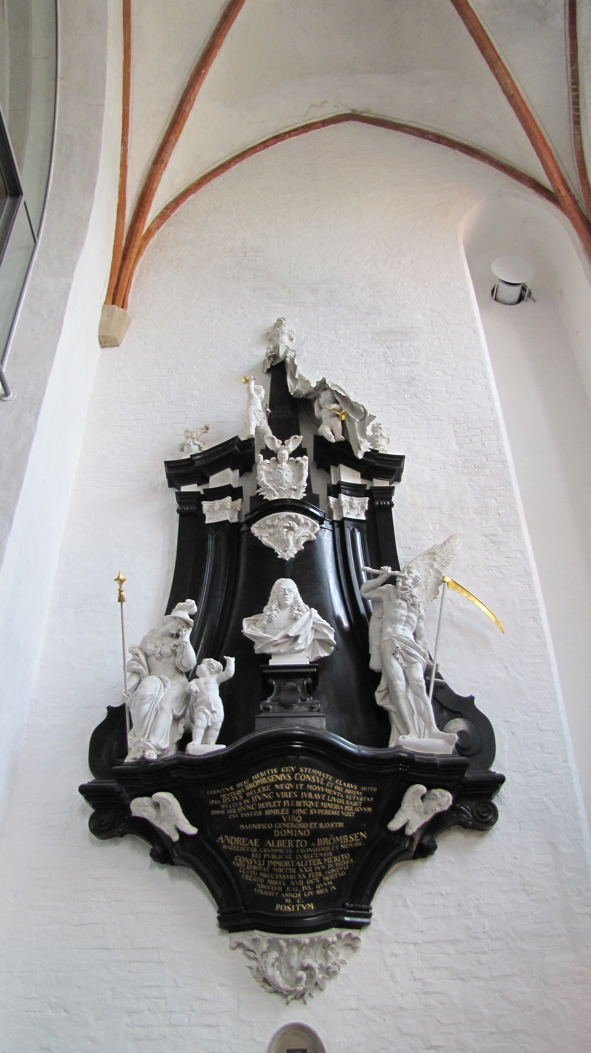 Epitaph for mayor Andreas Albrecht von Brömbsen (1703-1767) in St. Jakobi, Lübeck